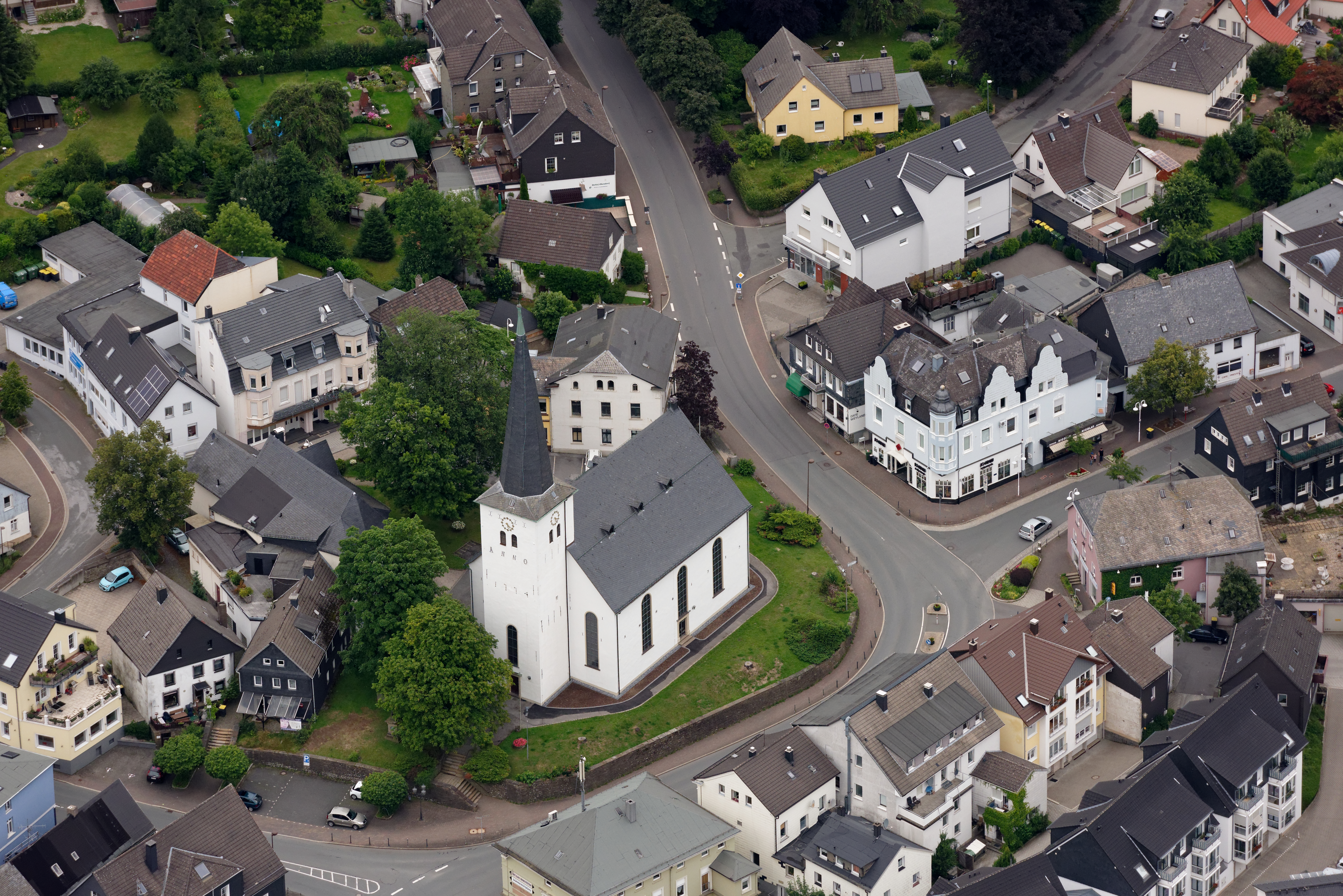 Luftaufnahme: Nicolai-Kirche im Ortskern von Halver, Nordrhein-Westfalen